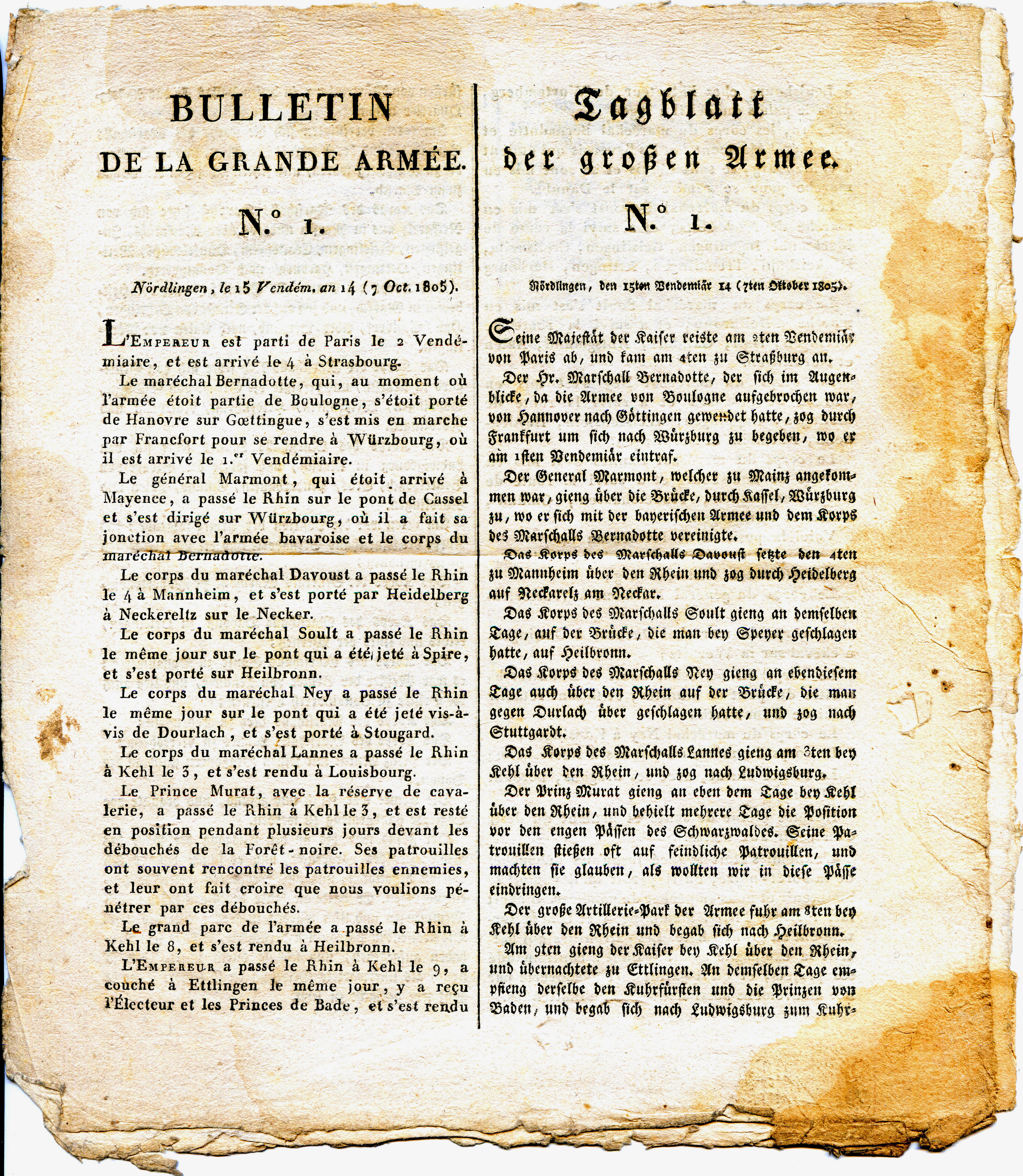 Bulletin n° 1 page 1 Rédigé en Français et Alsacien en octobre 1805